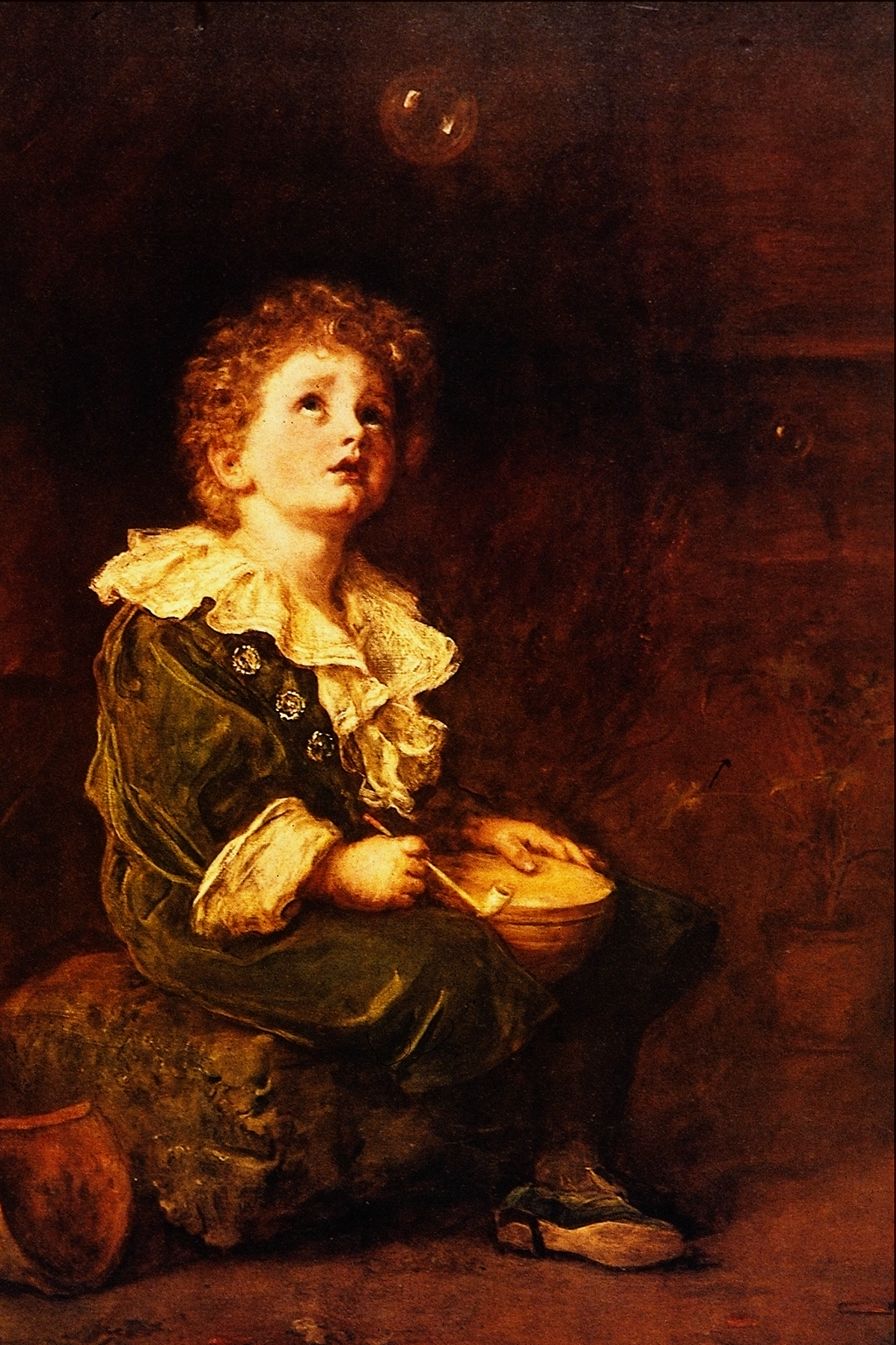 Bubbles